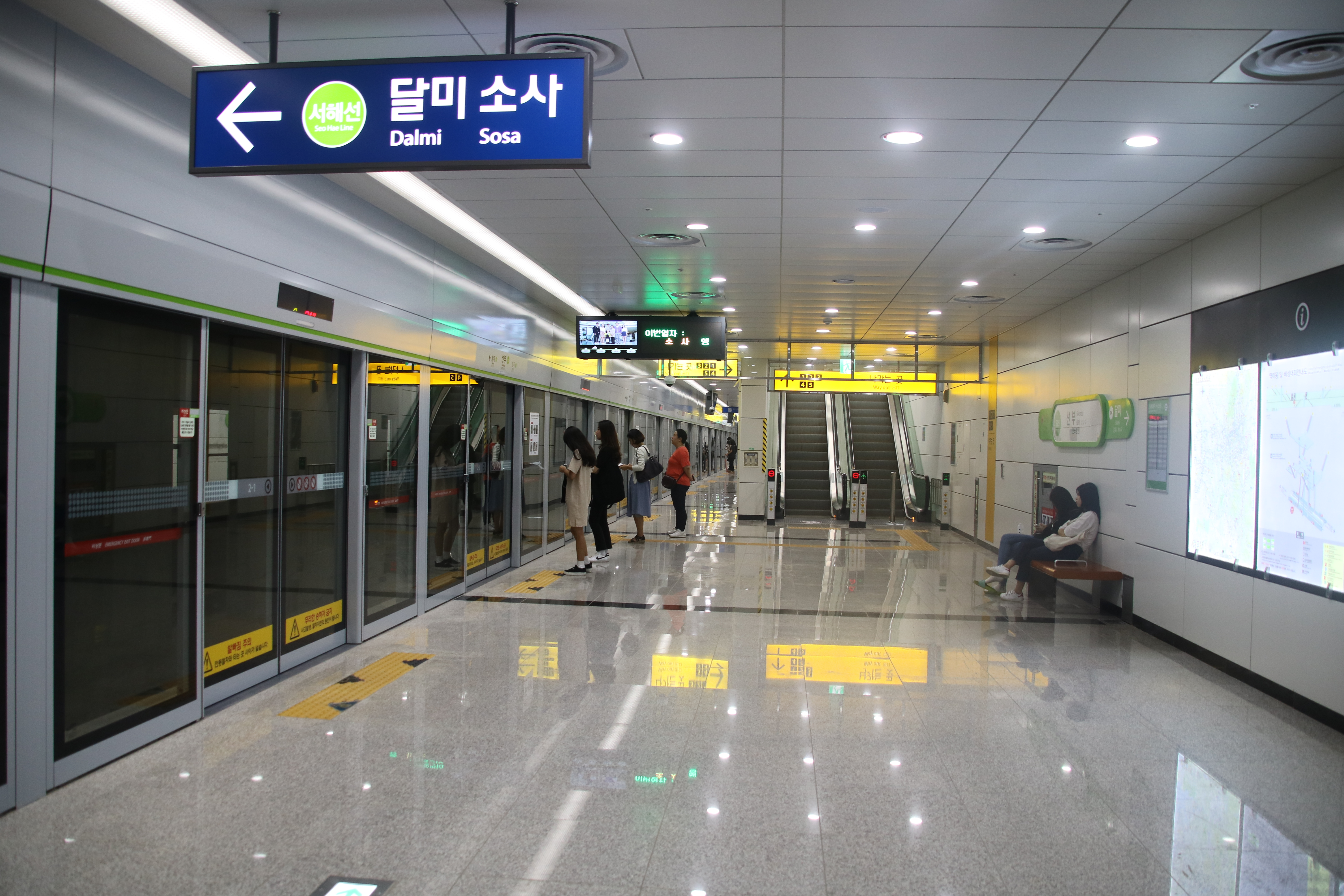 선부역 승강장